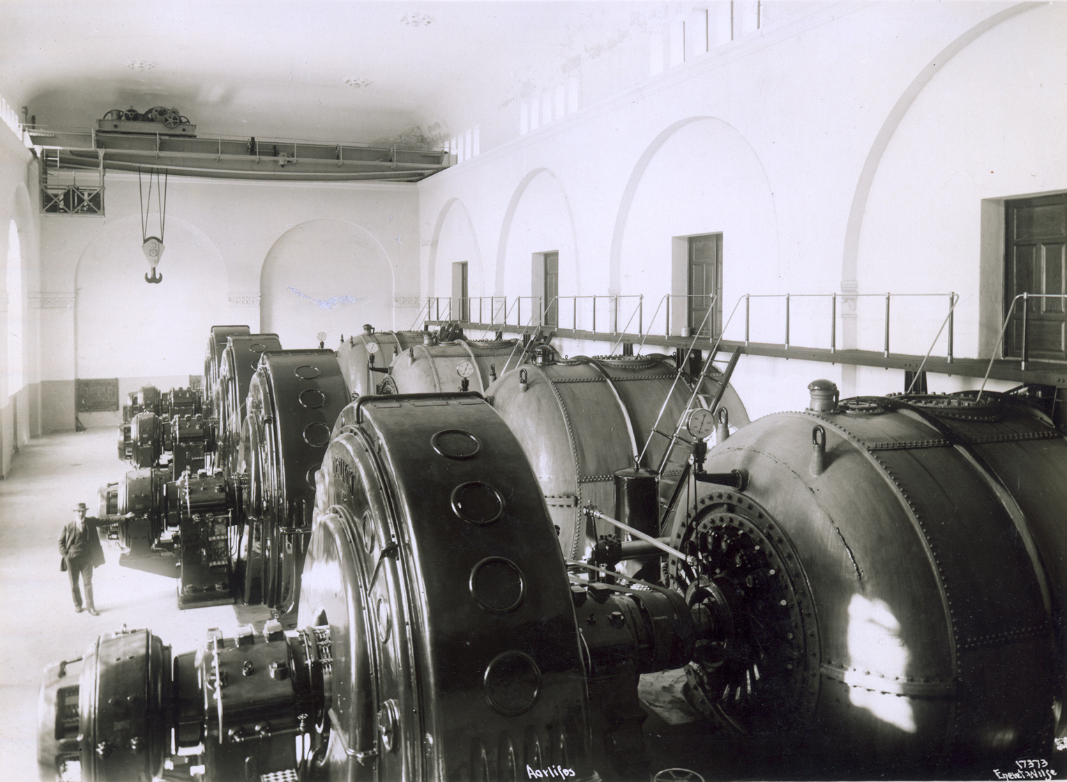 Aarlifoss kraftanlegg (AS Hafslund/Arendal fossekompani). Interiør maskinhall. Elektrisitetsdirektoratet. Dato: xx.xx.xxxx